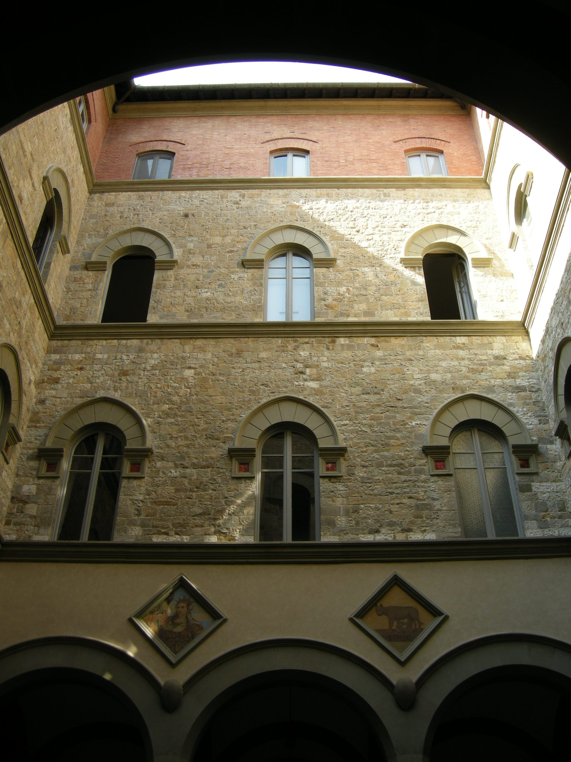 Caserna antonio baldissera, cortile